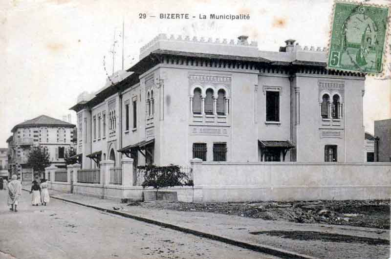 La minicipalité de Bizerte, Bizerte, Tunisie